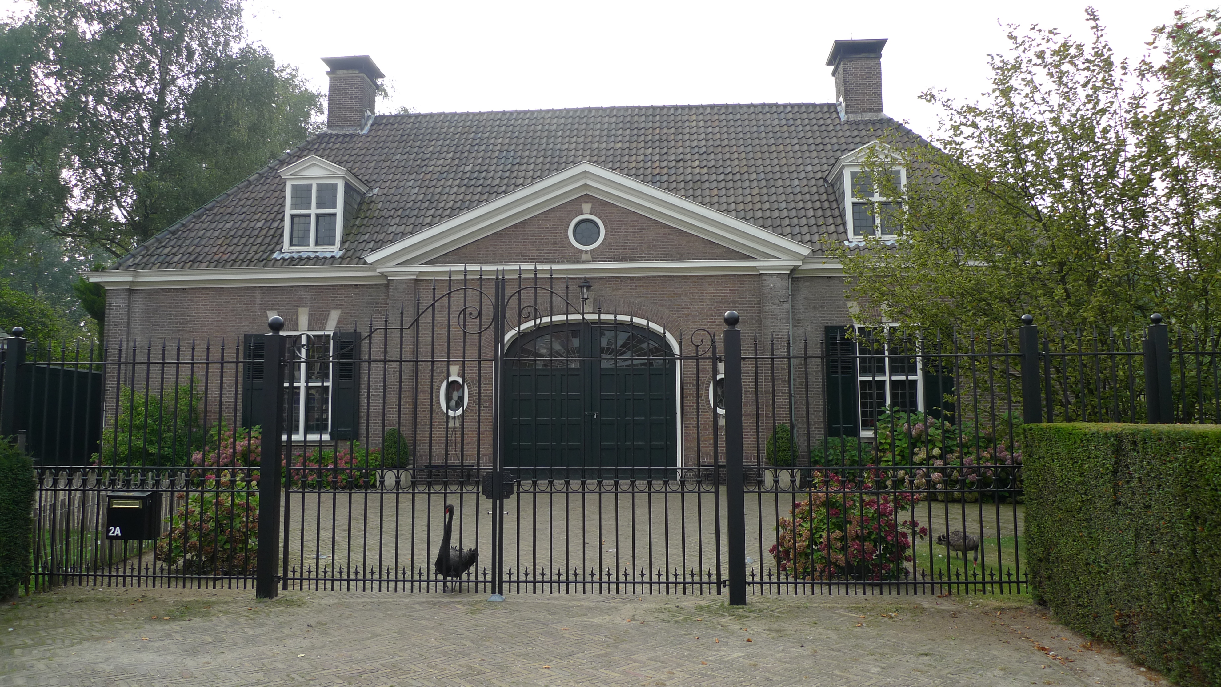 Koetshuis bij Villa De Laak in Eindhoven, Nederlands rijksmonument nr 518760